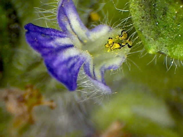 Blåsuga. Blomman är uppförstorad med USB-mikroskop